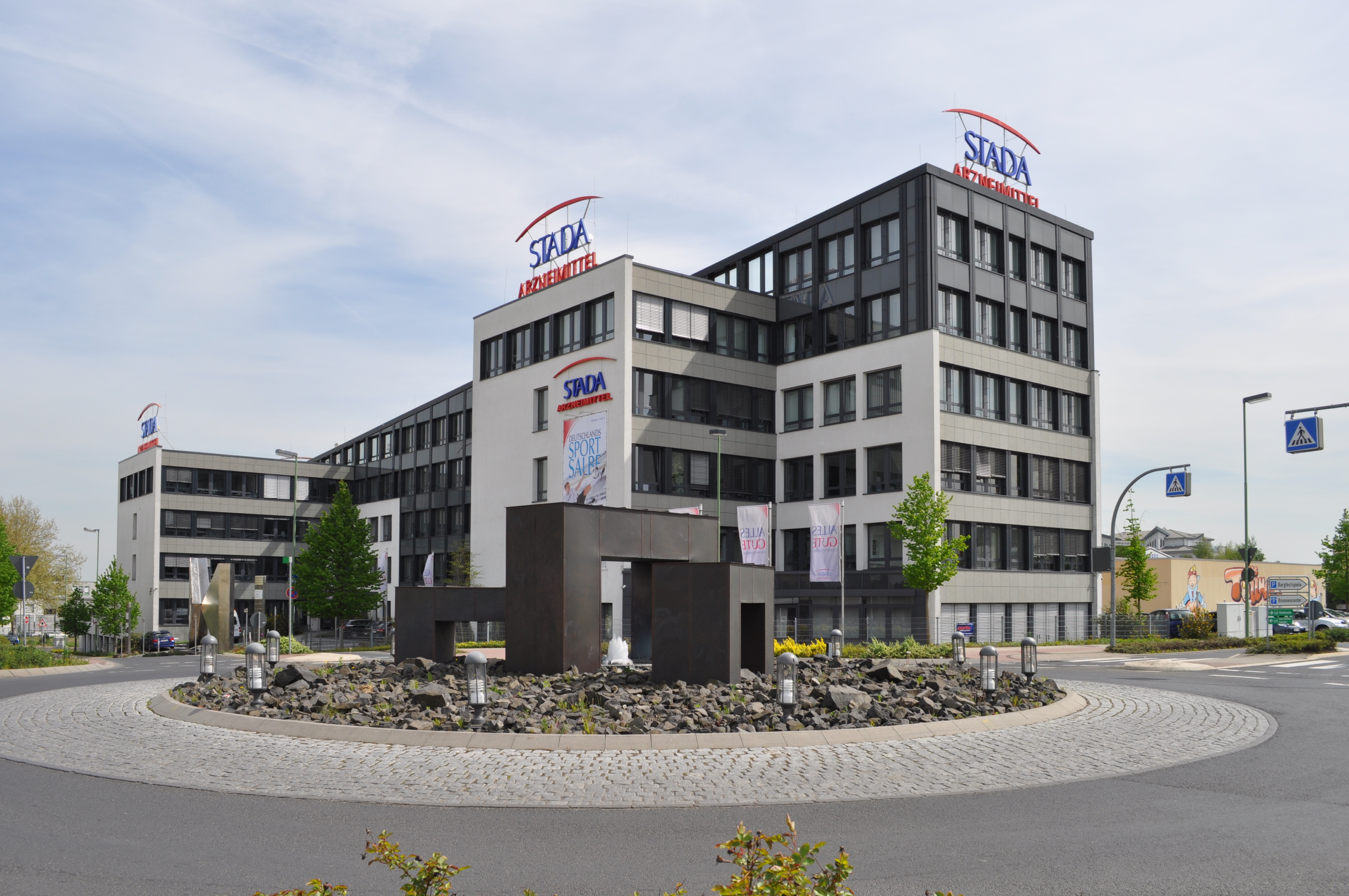 Dortelweil: Brunnen "Wasserwerk Ensemble" und Firma Stada im Hintergrund